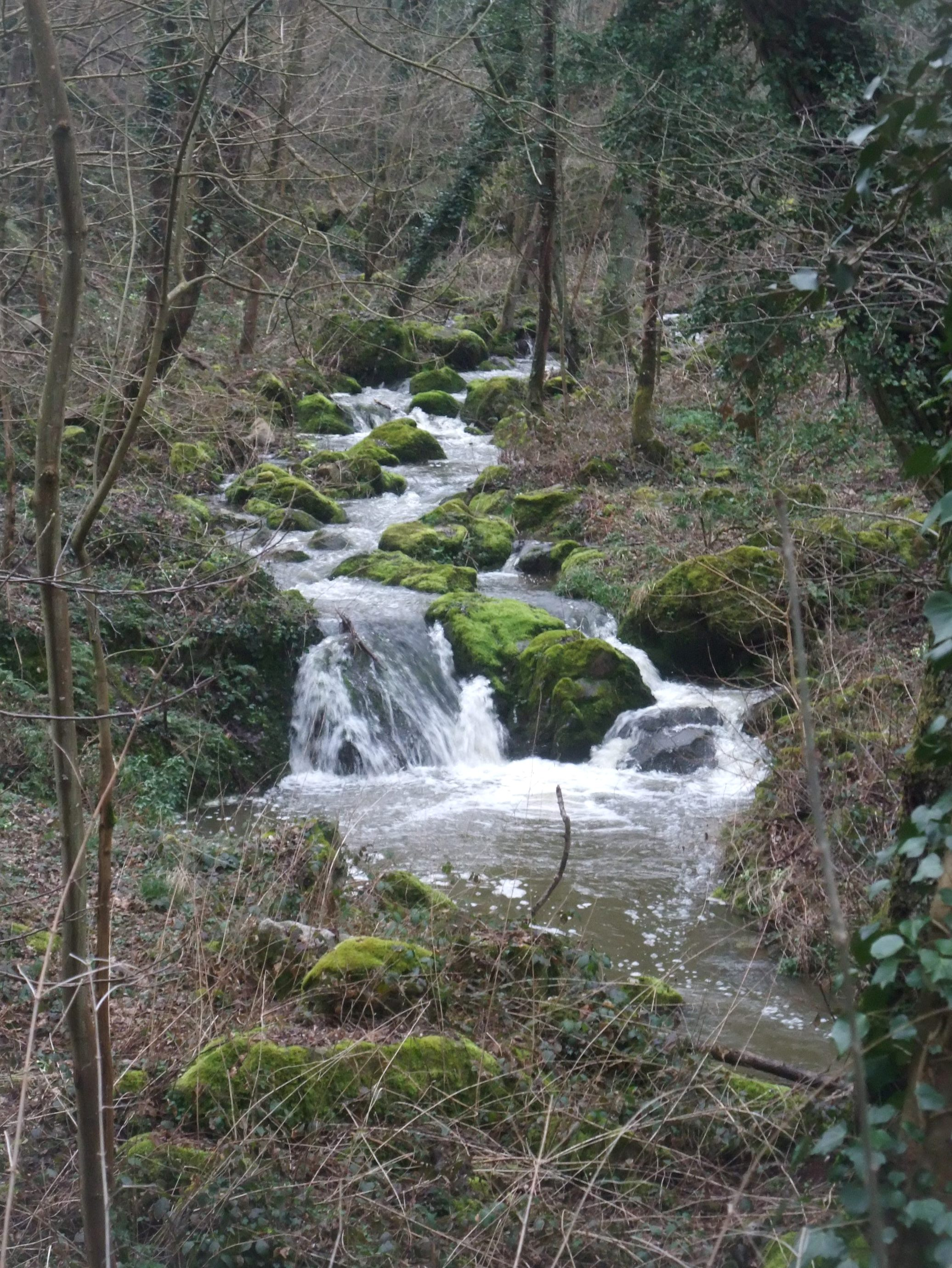 Torrenson river